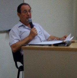 "דן ארבל מרצה"